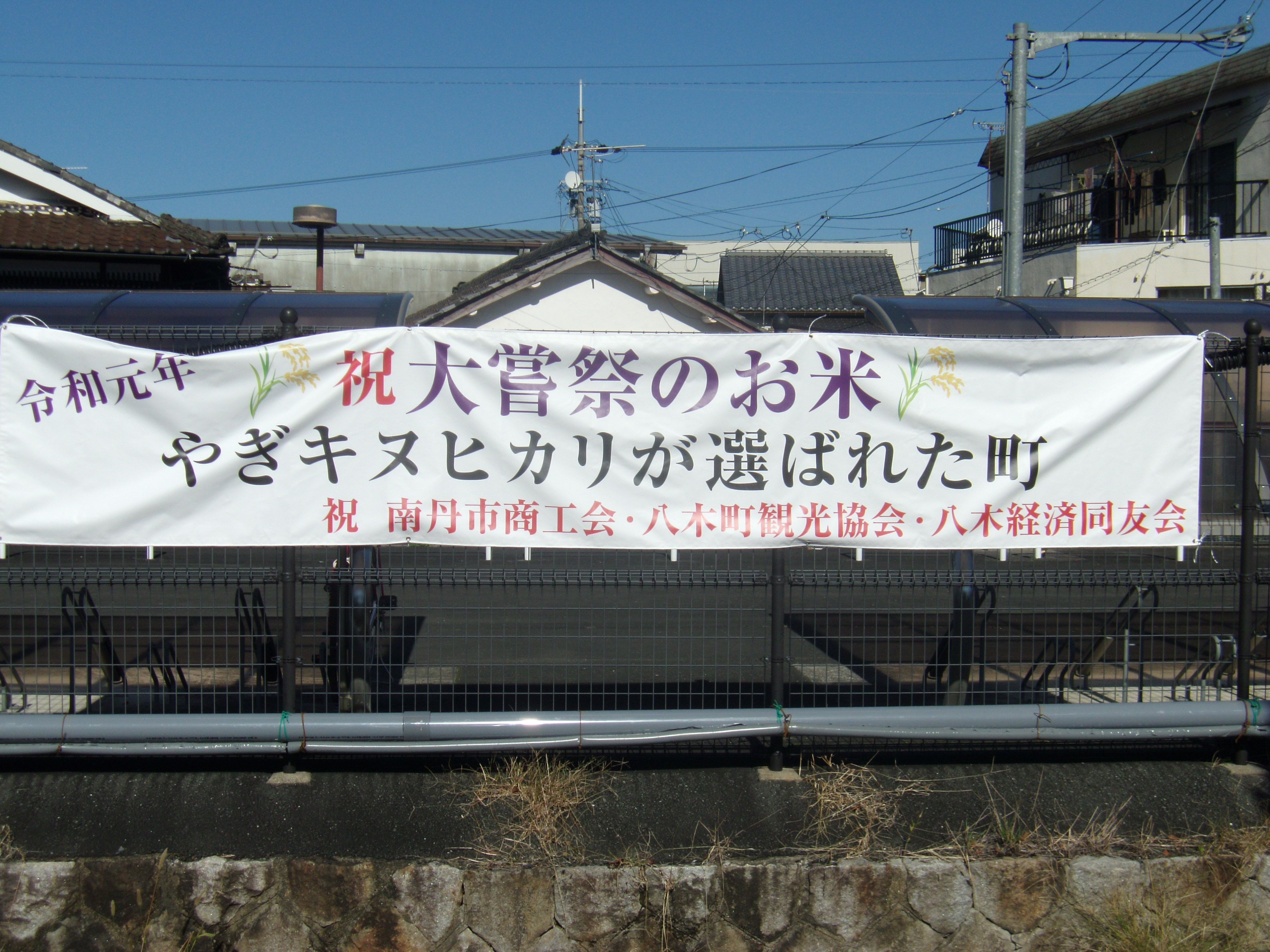 八木駅に掲げられた令和の主基田選定を記念する横断幕